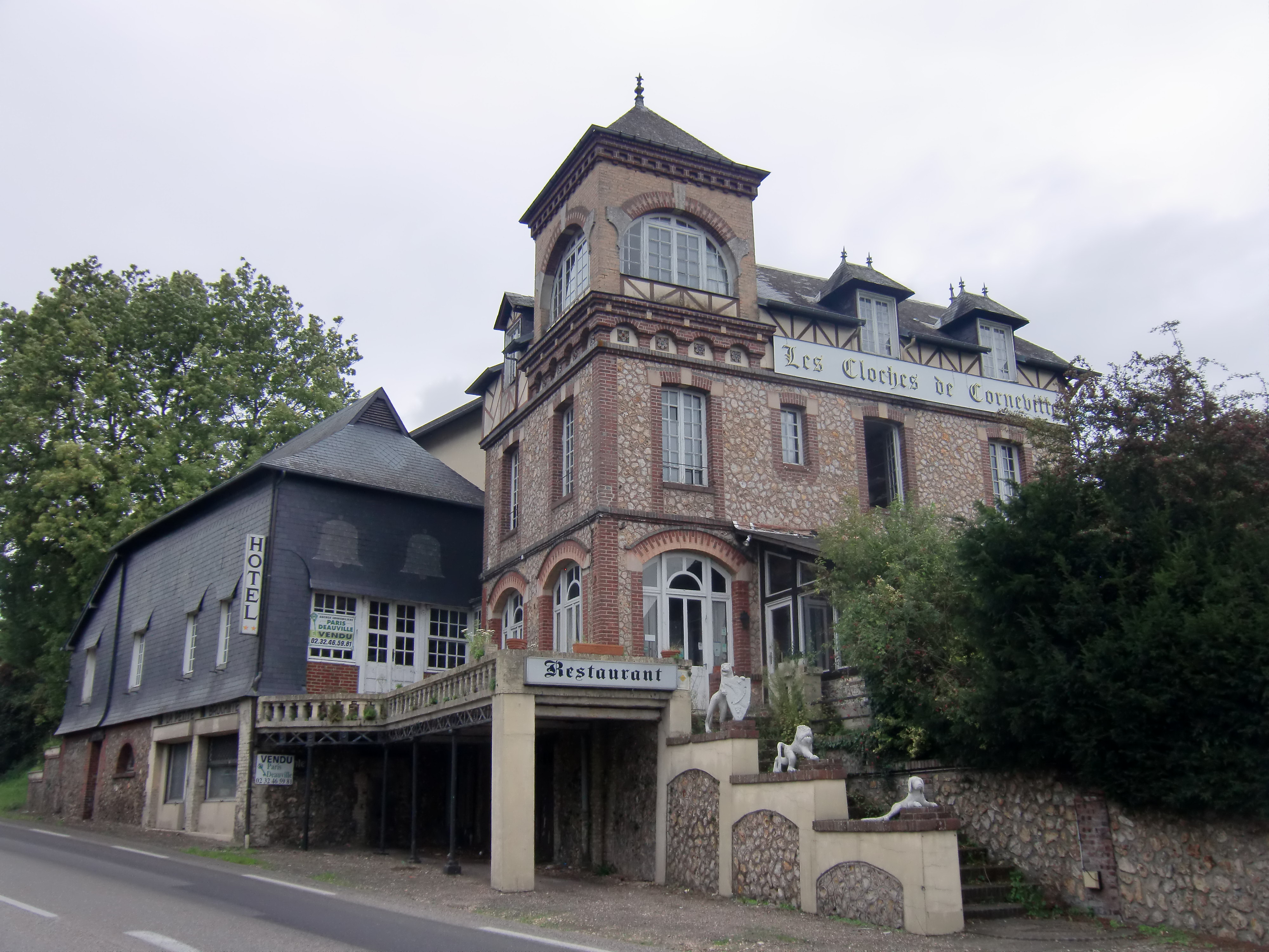 Corneville-sur-Risle (Eure, Normandie, France) : Hôtel des Cloches